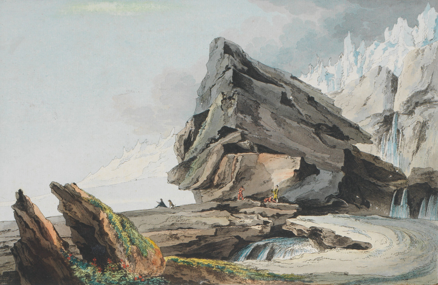 Une partie des Glaciers de la Montagne de Gelten, dans le Canton de Berne